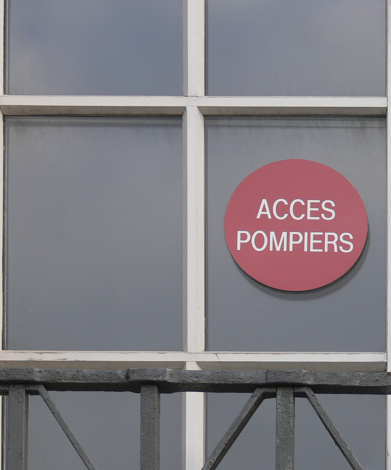 Fenêtre d'«accès pompier» (Lille, France)